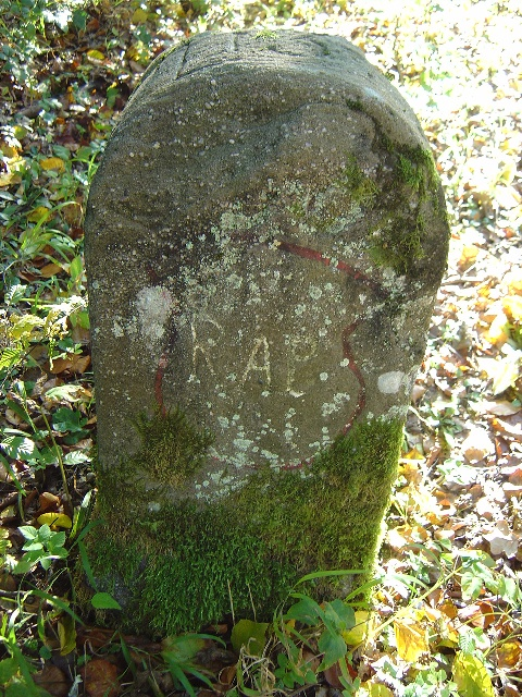 Grenzstein zwischen dem abgegangenen Dorf Rappertshäusern und Möhlin. Der Grenzstein aus dem Jahr um 1600 trägt die Inschrift "RAP" und auf der Rückseite das österreichische Wappen. Standort: An einem Waldweg im Gebiet "Unterforst" der Gemeinde Möhlin.